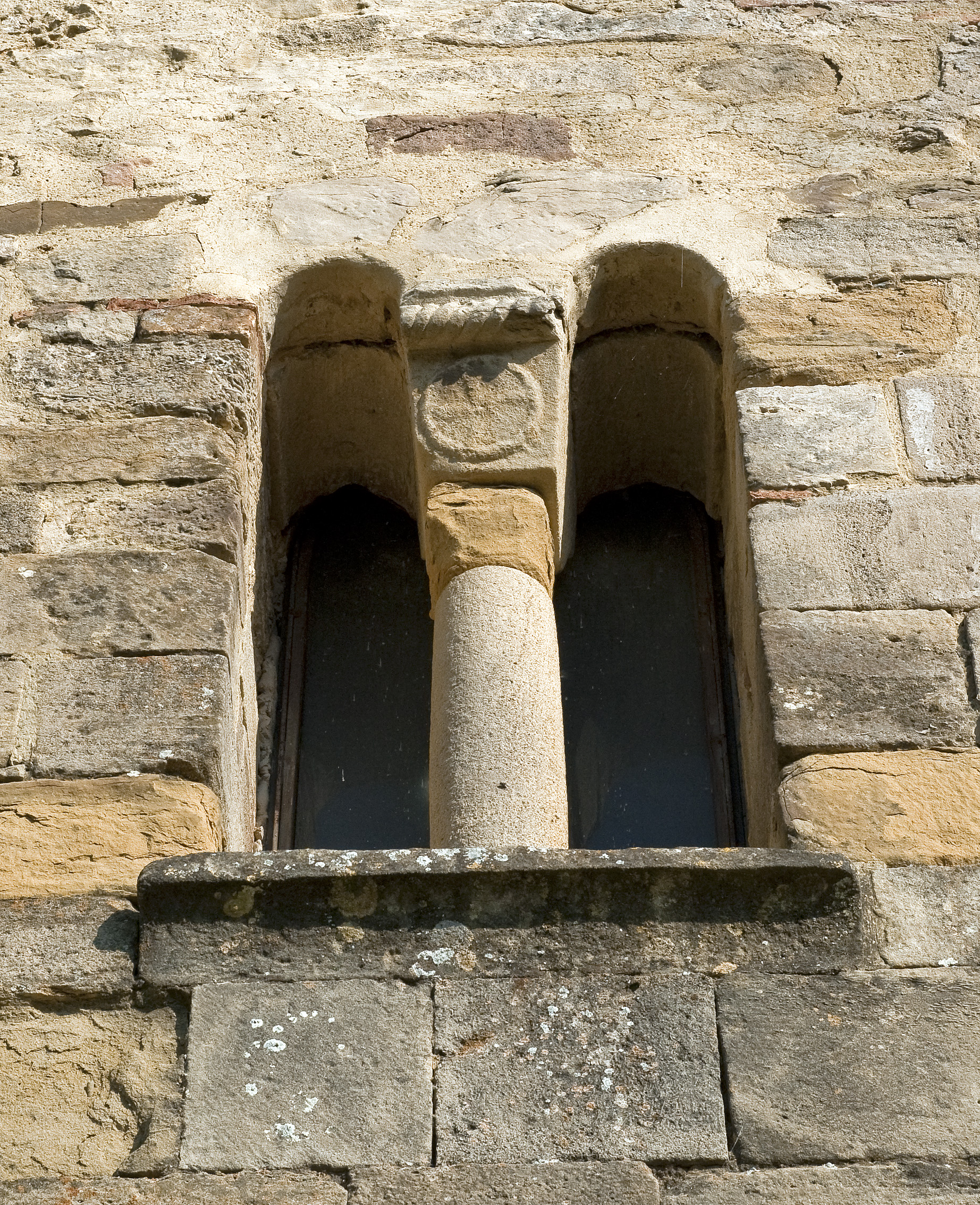 Bifora posta sulla facciata della chiesa di san Donato a Gavignano, Poggibonsi